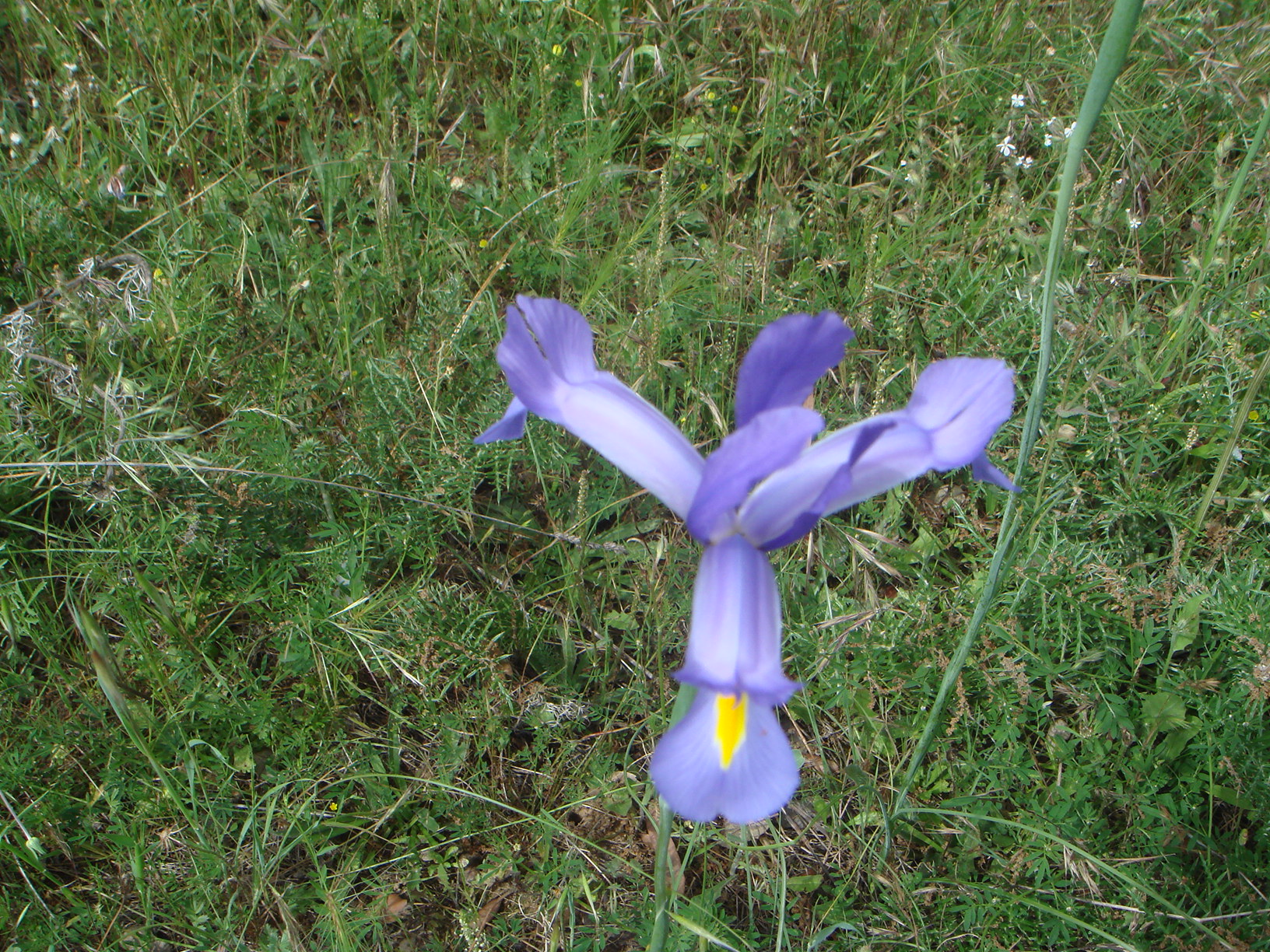 Iris xiphium, Norte de Sevilla, España